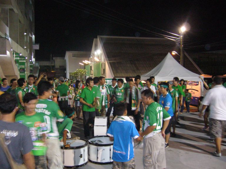 BGFC supporter @ LEO Stadium